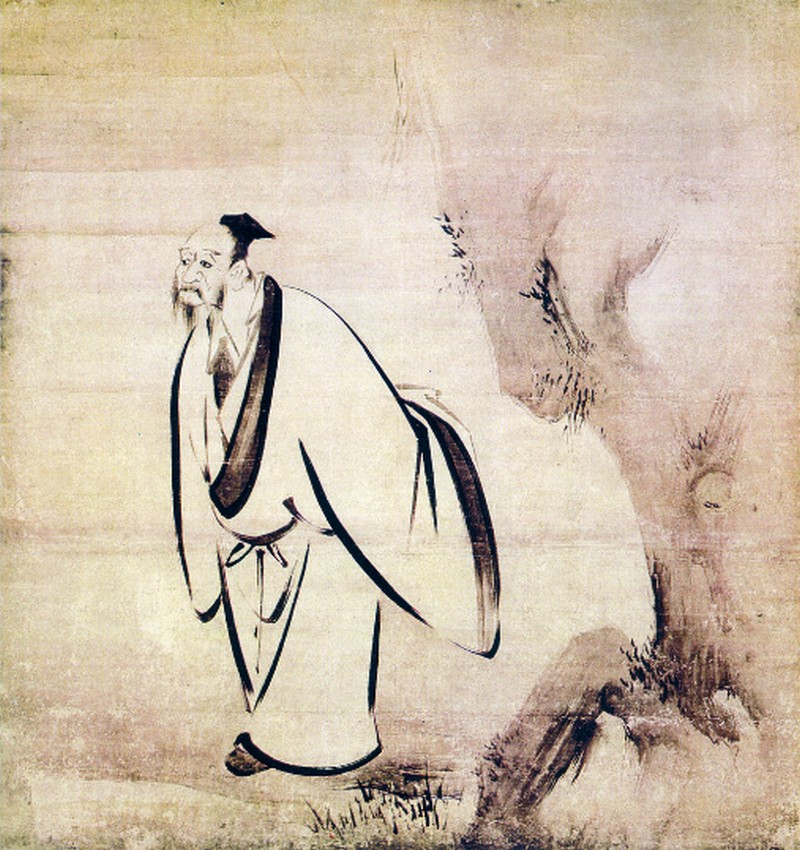 L'un des sept sages, (1533-1615), encre sur papier, hauteur du panneau: 158cm. par le peintre japonais Kaihō Yūshō. Kyōto (Kennin-ji).